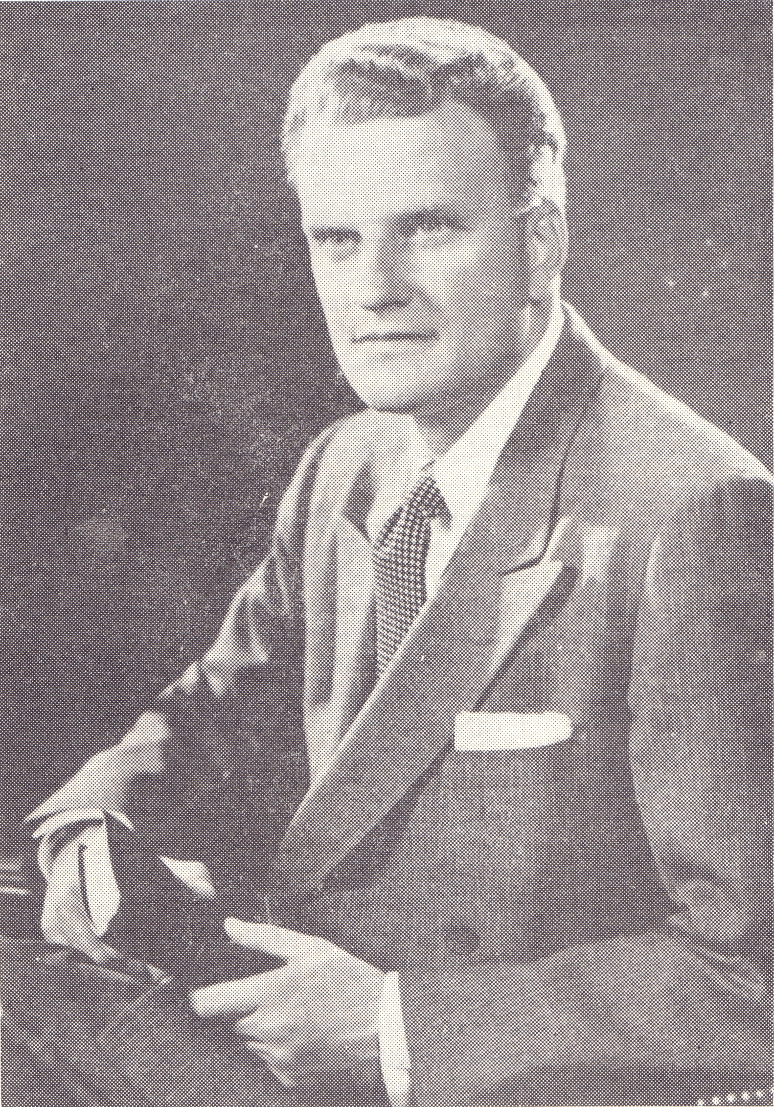 portrait of Billy Graham on the front of page of the Słowo Prawdy